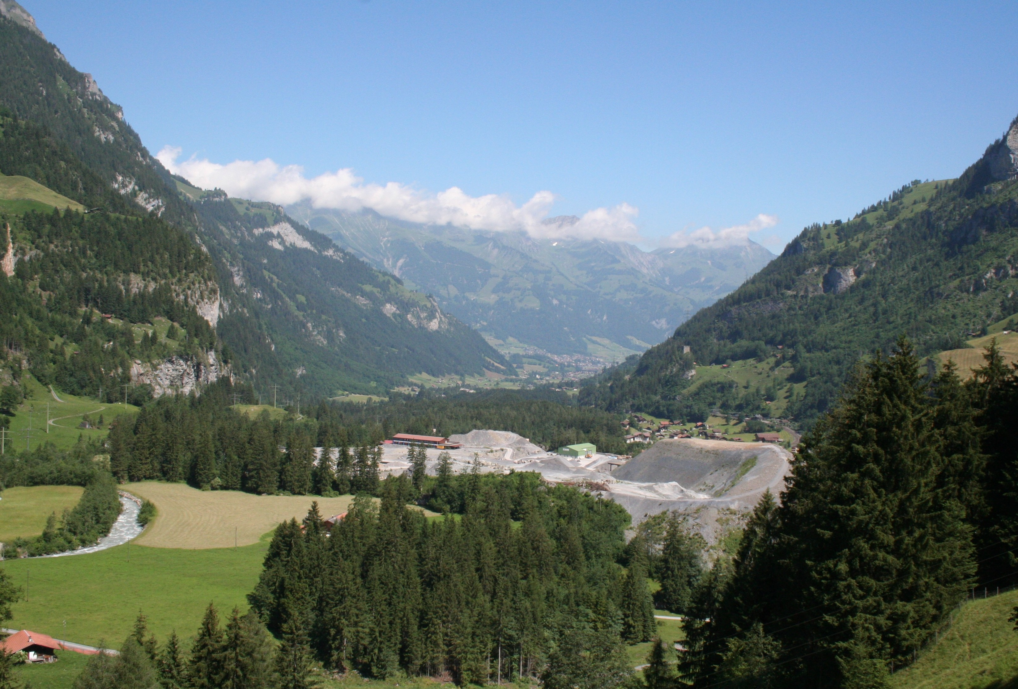 Kandertal im Berner Oberland Richtung Norden. In der Mitte der Aushub des Lötschberg-Basistunnels.